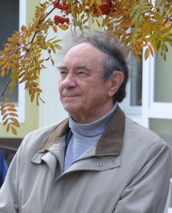 Панин В.Е. на 25-ти летии института (Вылазка на природу)